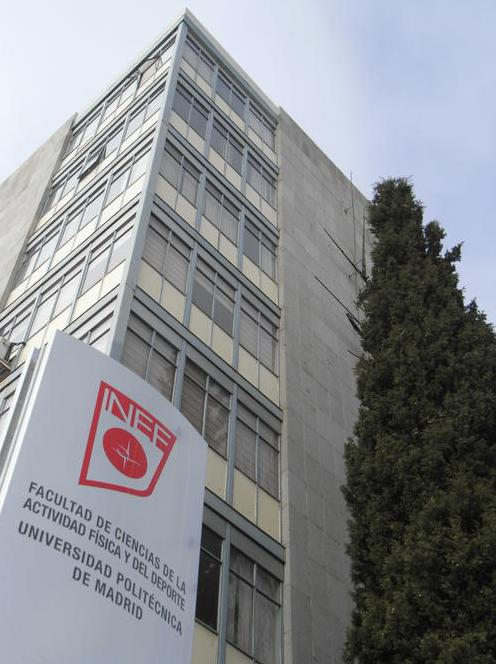 Facultad de ciencias de la Actividad Física y el deporte, Instituto Nacional de Educación Física, Universidad Politécnica de Madrid.